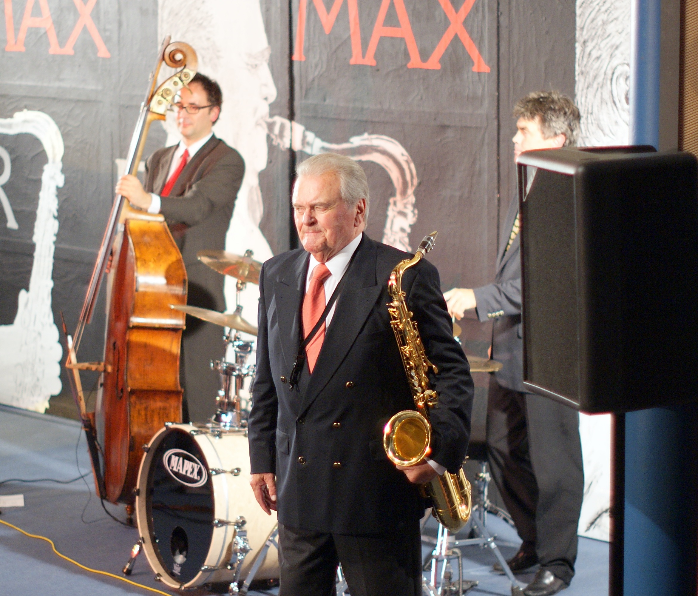 Max Greger 2008 bei einem Auftritt im Ostalbgymnasium Bopfingen, Im Hintergrund Mini Schulz (Bass) und Werner Schmitt (Schlagzeug)